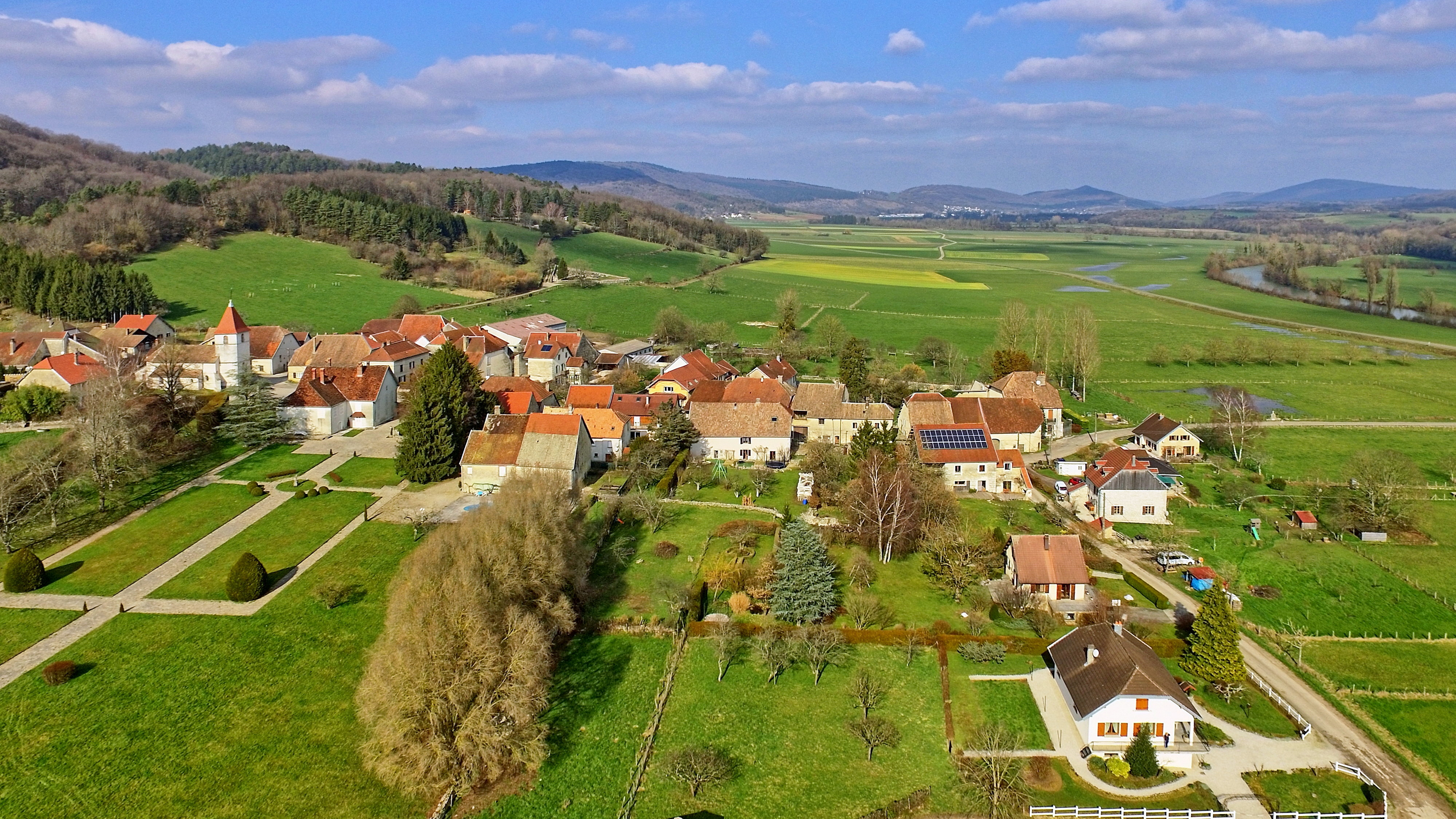 Vue générale du village